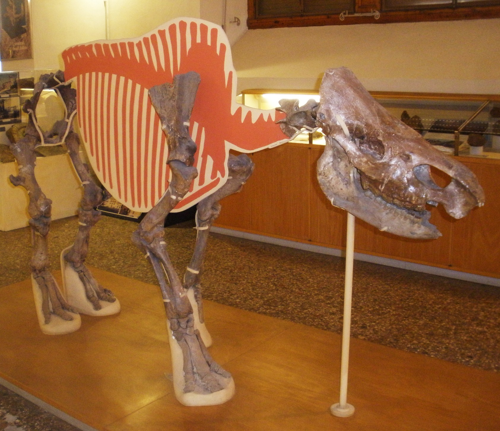 Fossil of Stephanorhinus, an extinct mammal -- Topok the picture at Museo di Paleontologia di Firenze